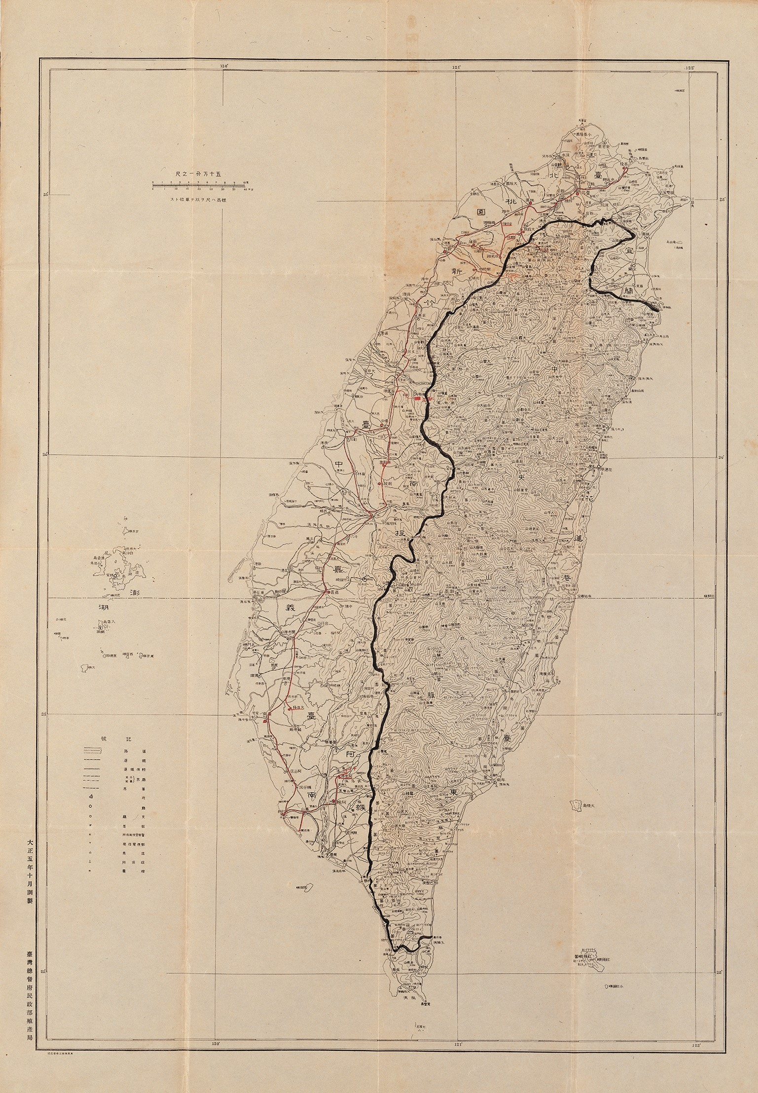 中文（台灣）: 臺灣總督府民政部殖產局所製作的底圖，圖上黑色線段以東應該是代表高砂族區域，至於紅色的線段，應該是某位大官巡視的路線，巡視路線起端基隆上岸，終結於阿里港